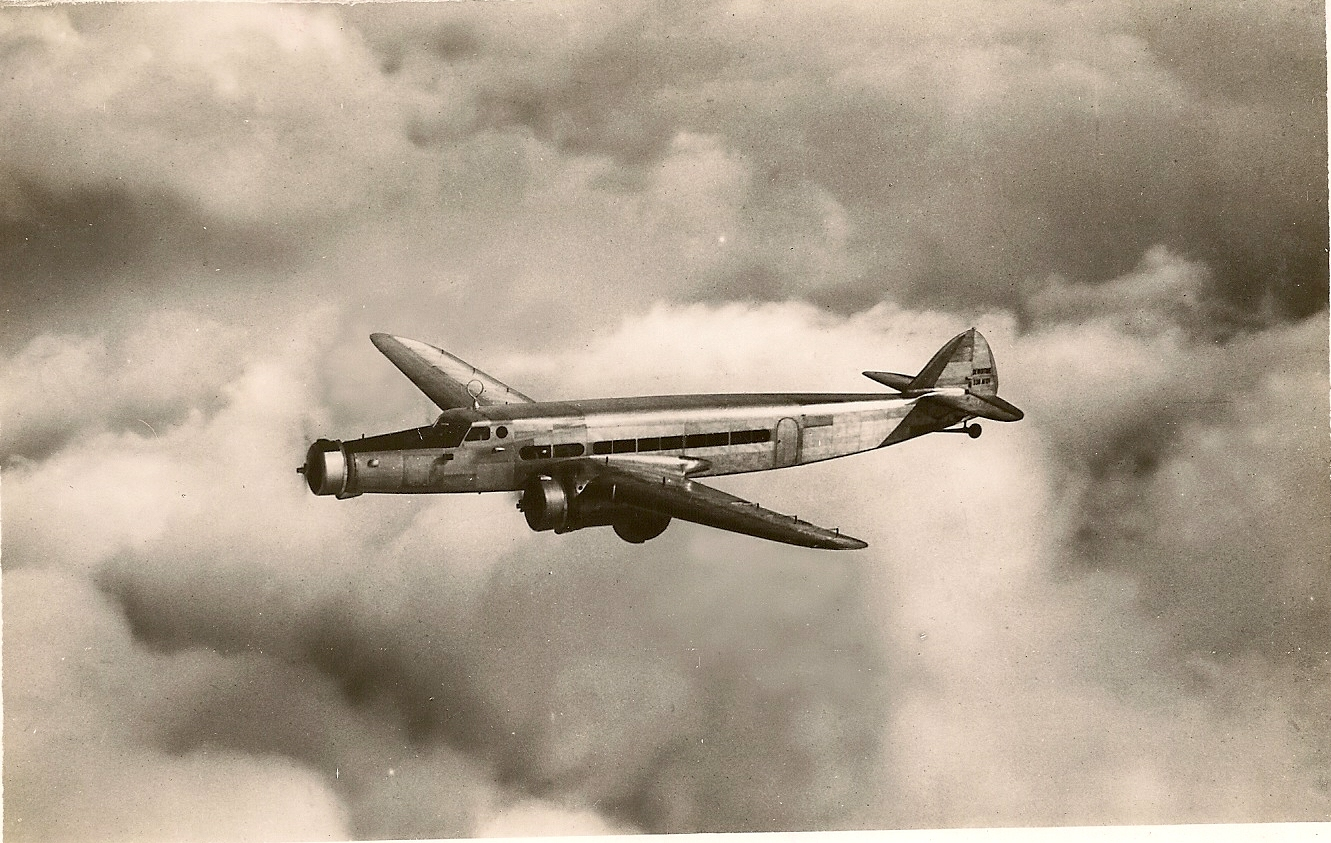 Avion trimoteur commercial Dewoitine D.338, en vol au dessus de l'Algérie. Cet avion fait partie certainement du loot rquisitionné par l'Armée de l'Air pour ses transports.